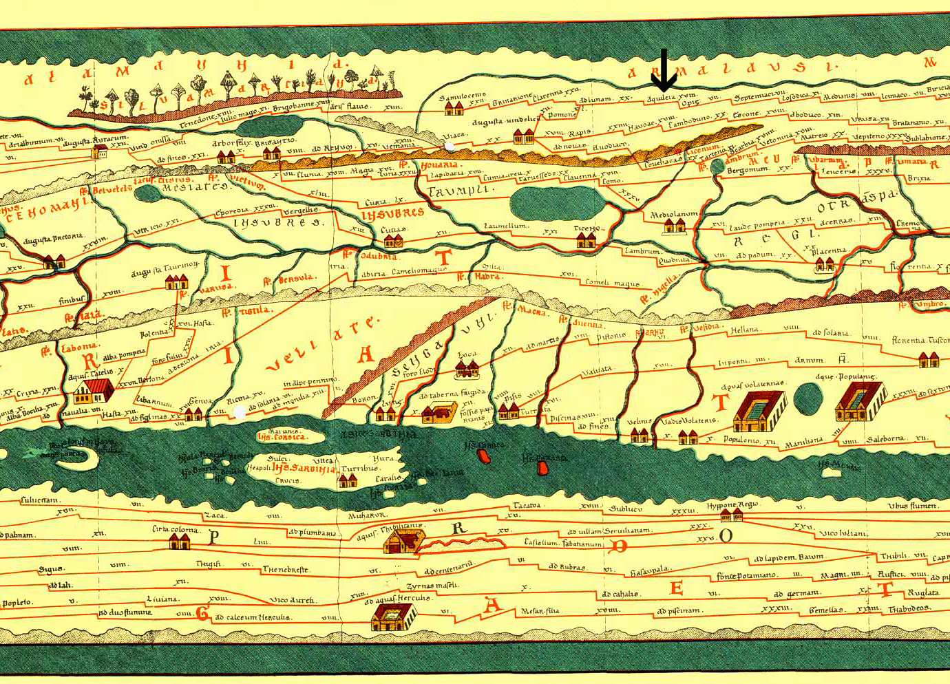 Ausschnitt aus der Tabula Peutingeriana mit Aquileia/Heidenheim am oberen Bildrand zwischen AD LUNAM (Lonsee) und OPIA (Oberdorf/Ipf)